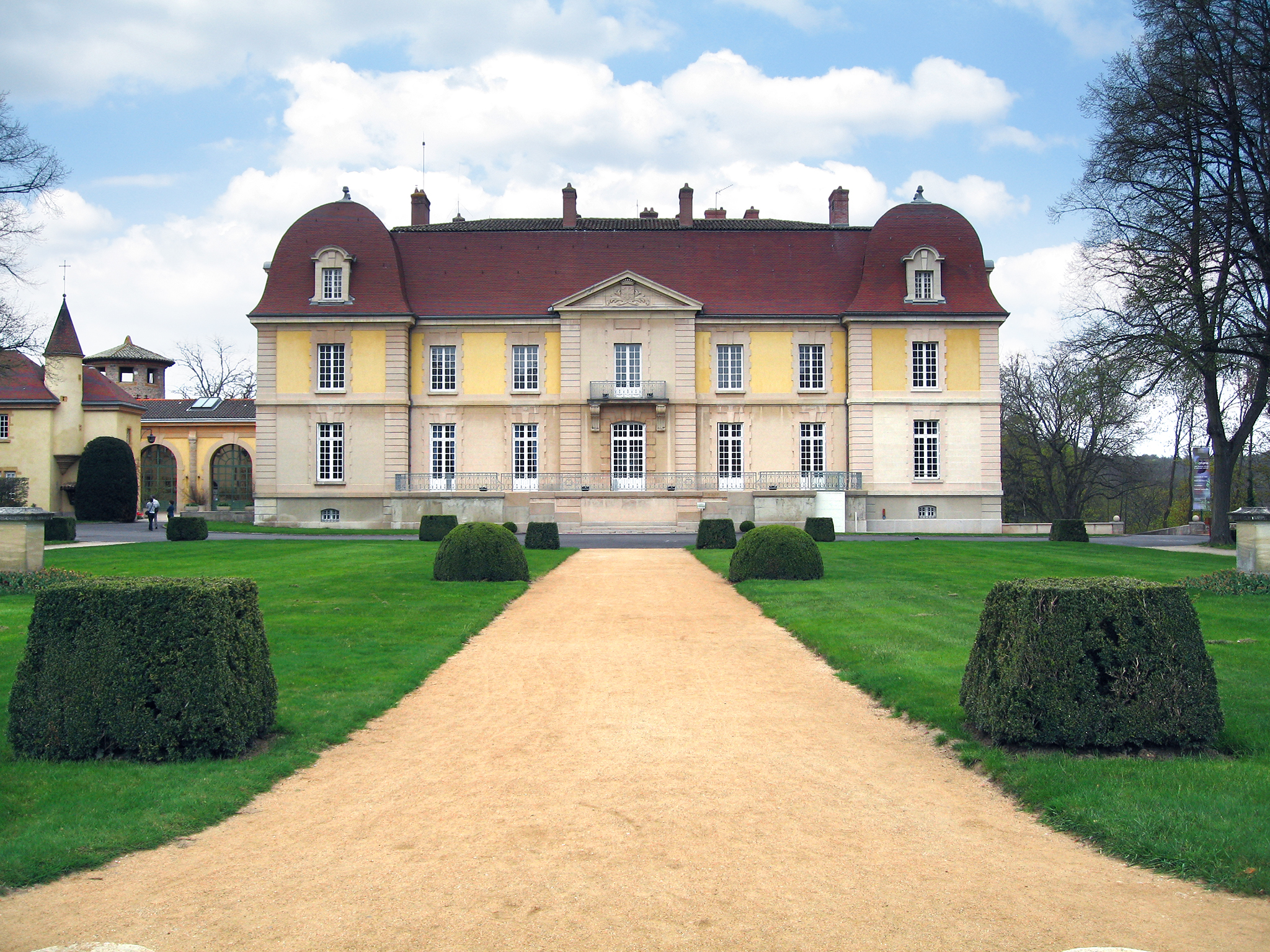 Marcy l'Etoile, France.